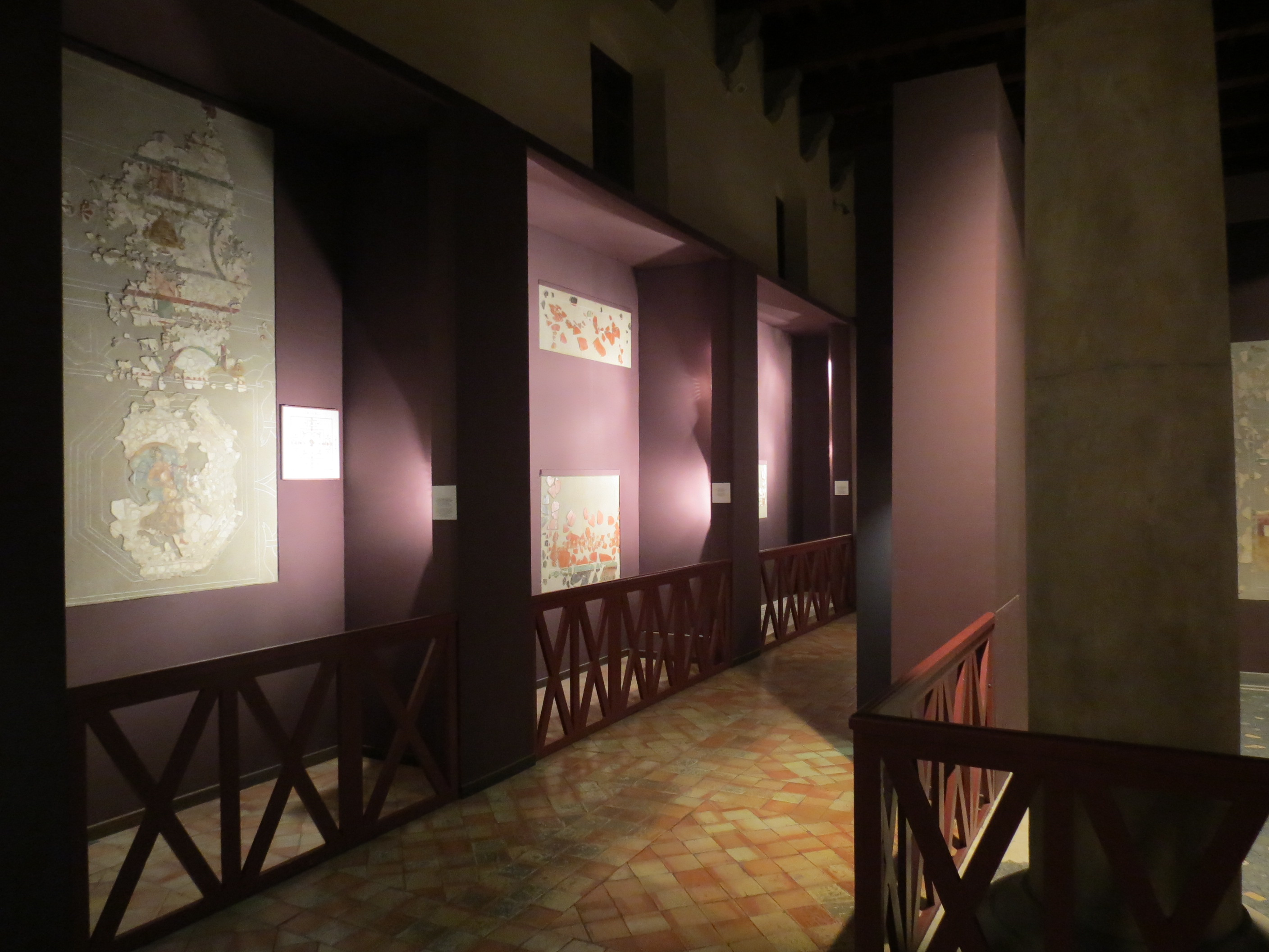 Musée archéologique de Narbonne, Aude, Languedoc-Roussillon.